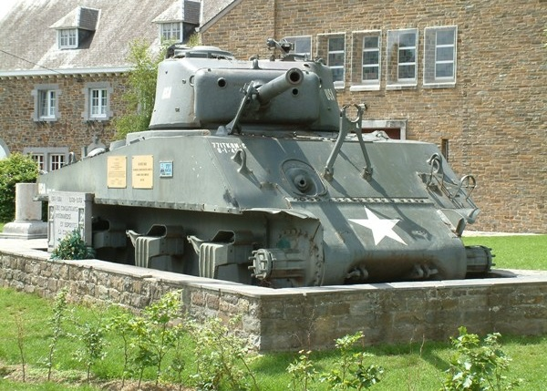 Le char Sherman M4 du groupe Hogan qui fût endommagé à l'entrée de Magoster, le 22 décembre 44. Wikidata has entry Q51209584 with data related to this item.